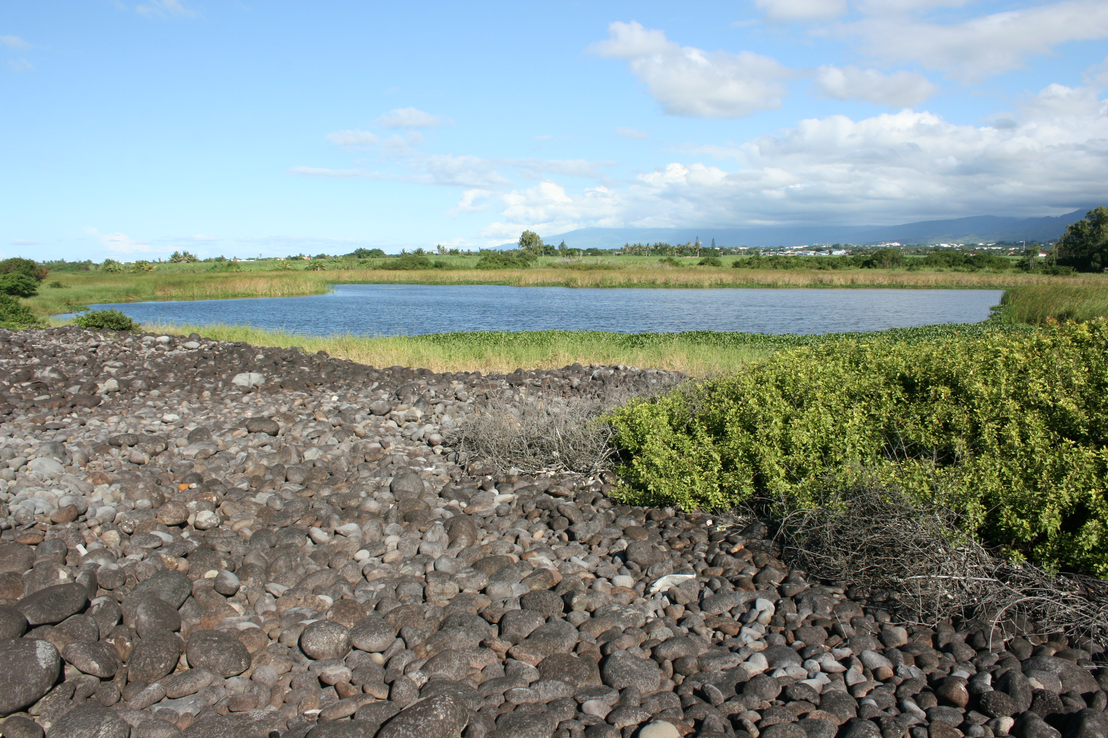 Vue de l'étang de Bois Rouge à Saint-André de La Réunion.